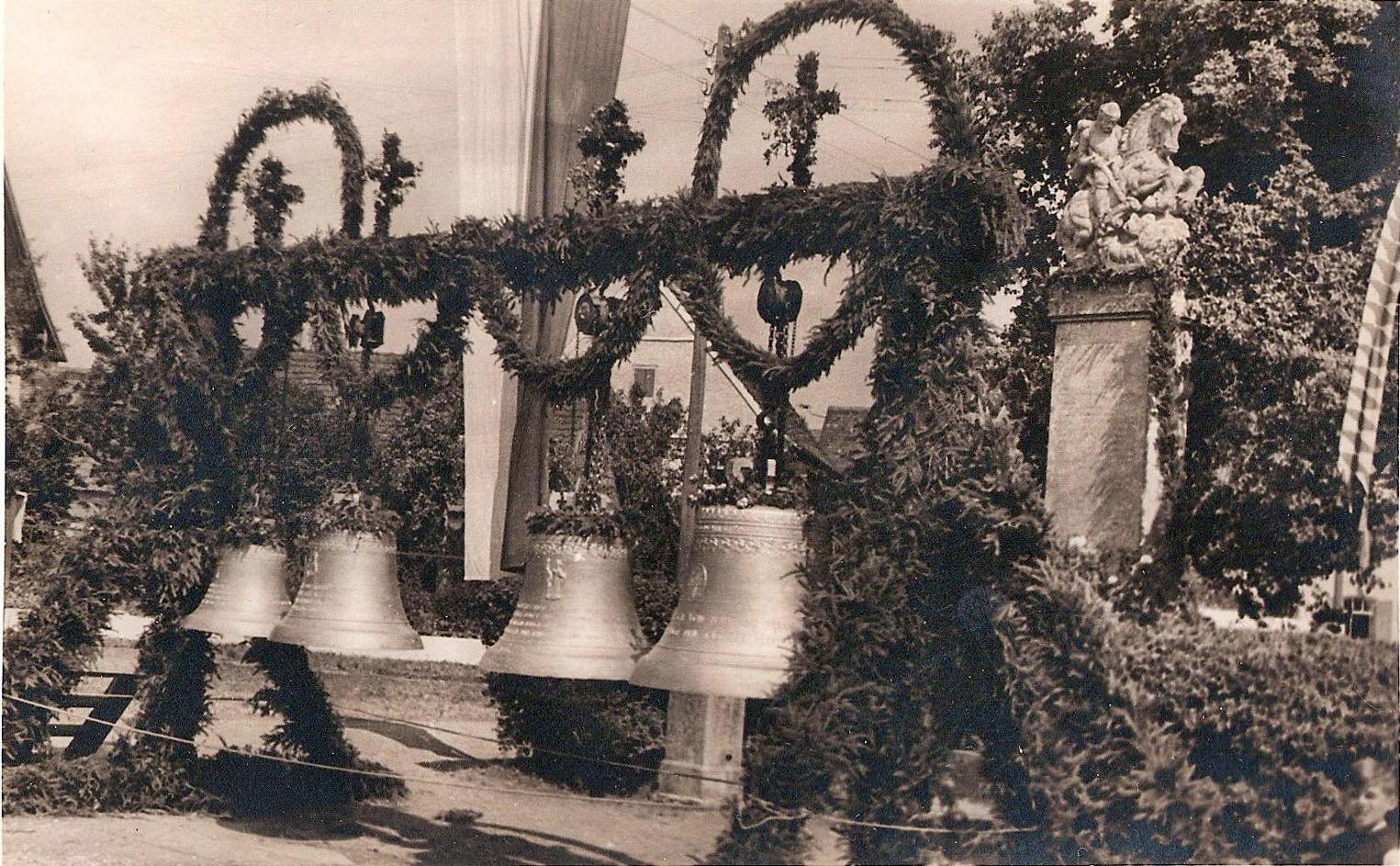 Weihe der neuen Glocken, St. Ulrich Amendingen